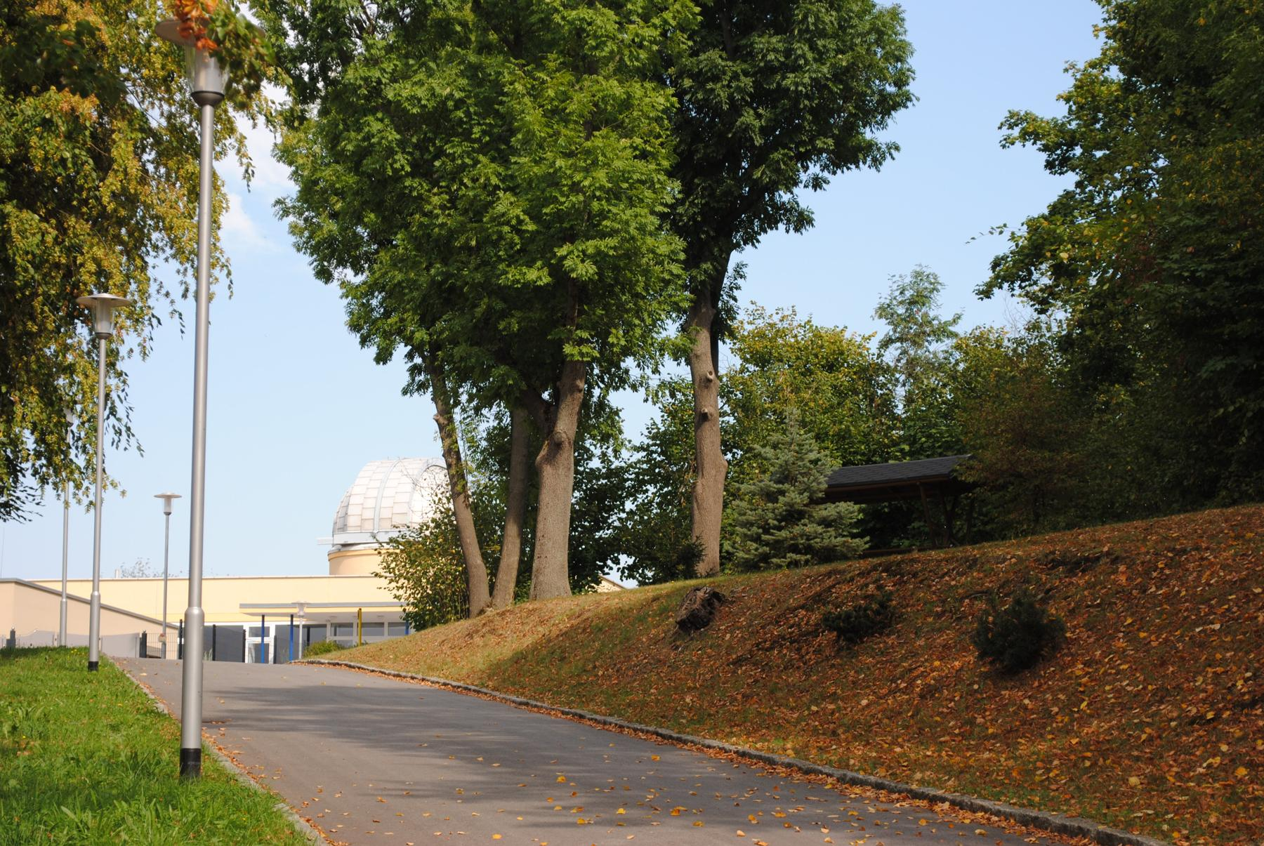 Sternwarte in Rodewisch - die alte befindet sich auf dem Gymnasium